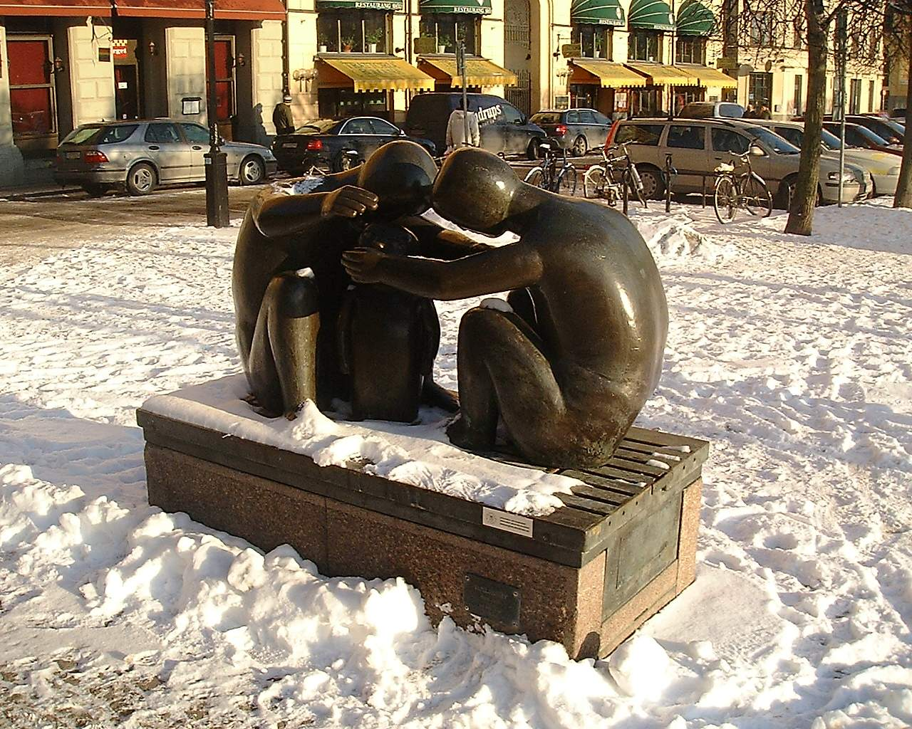 Sculpture Familjen at Mälartorget in Gamla stan.